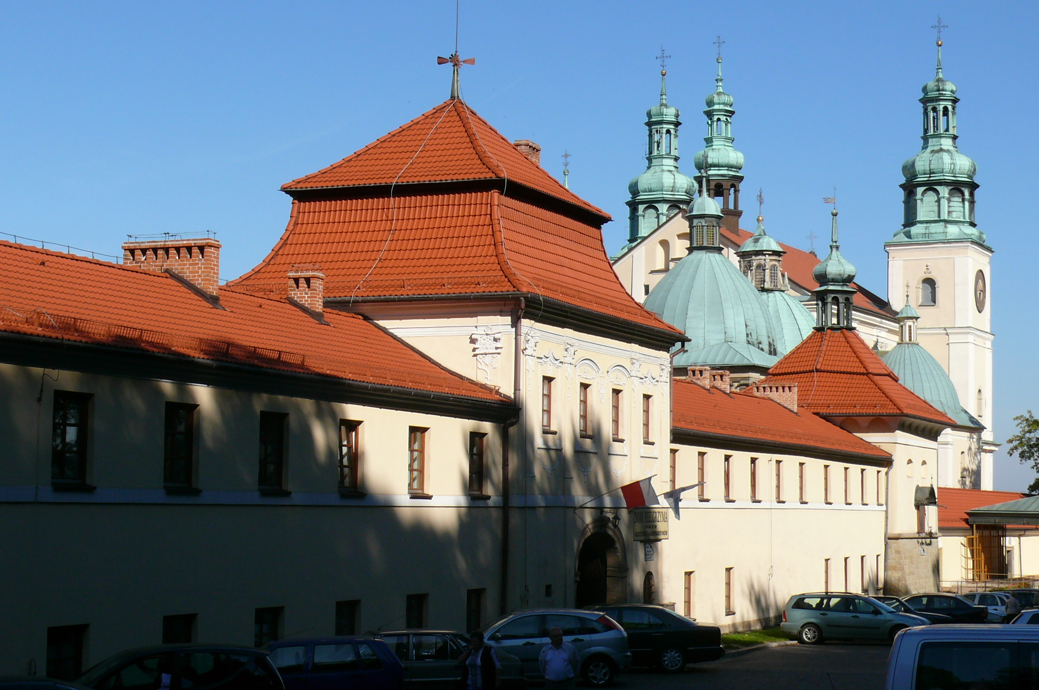 Sanktuarium pasyjno-maryjne w Kalwarii Zebrzydowskiej